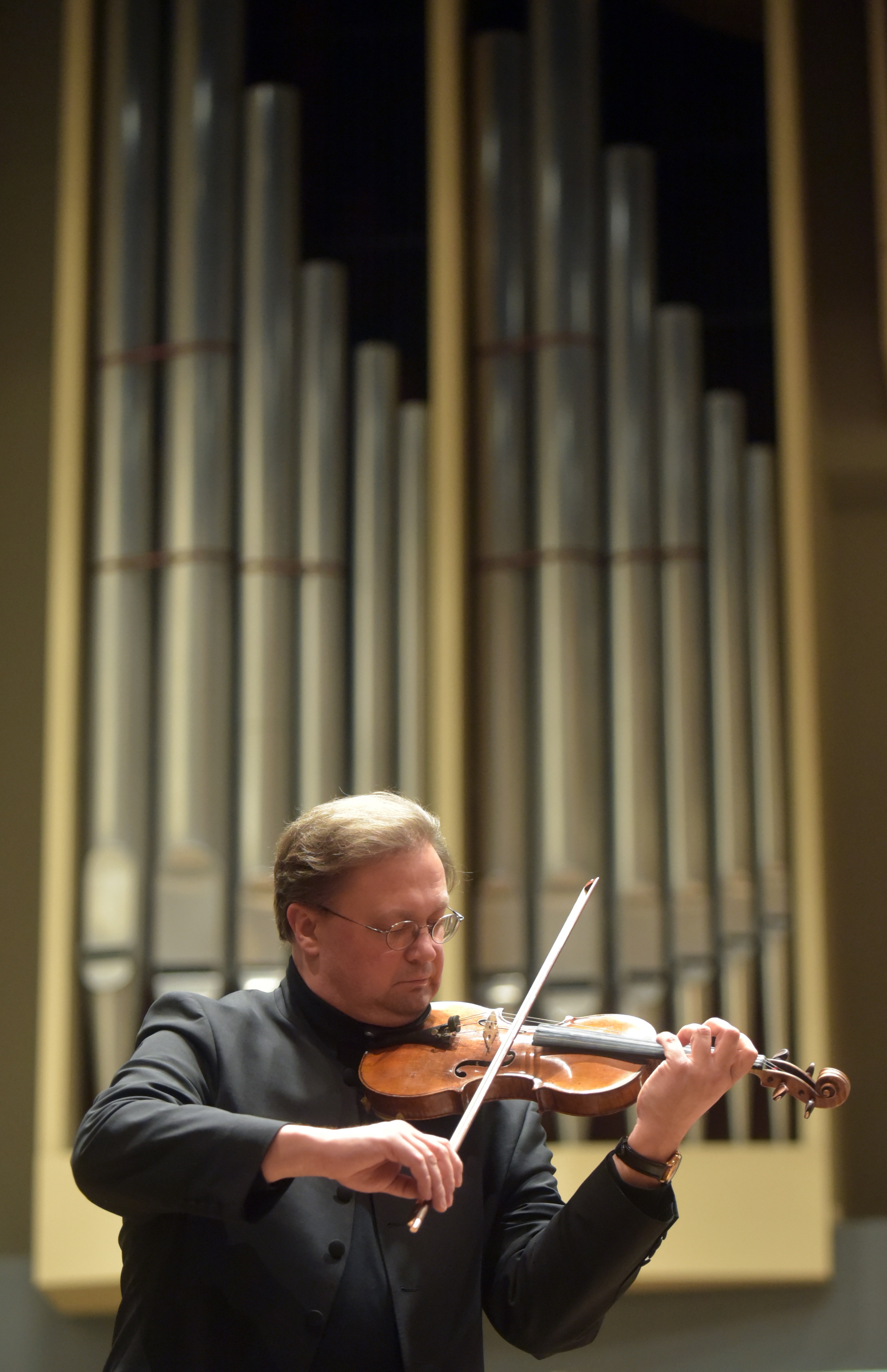 Matthias Wollong, Foto: Jan-Peter Kasper